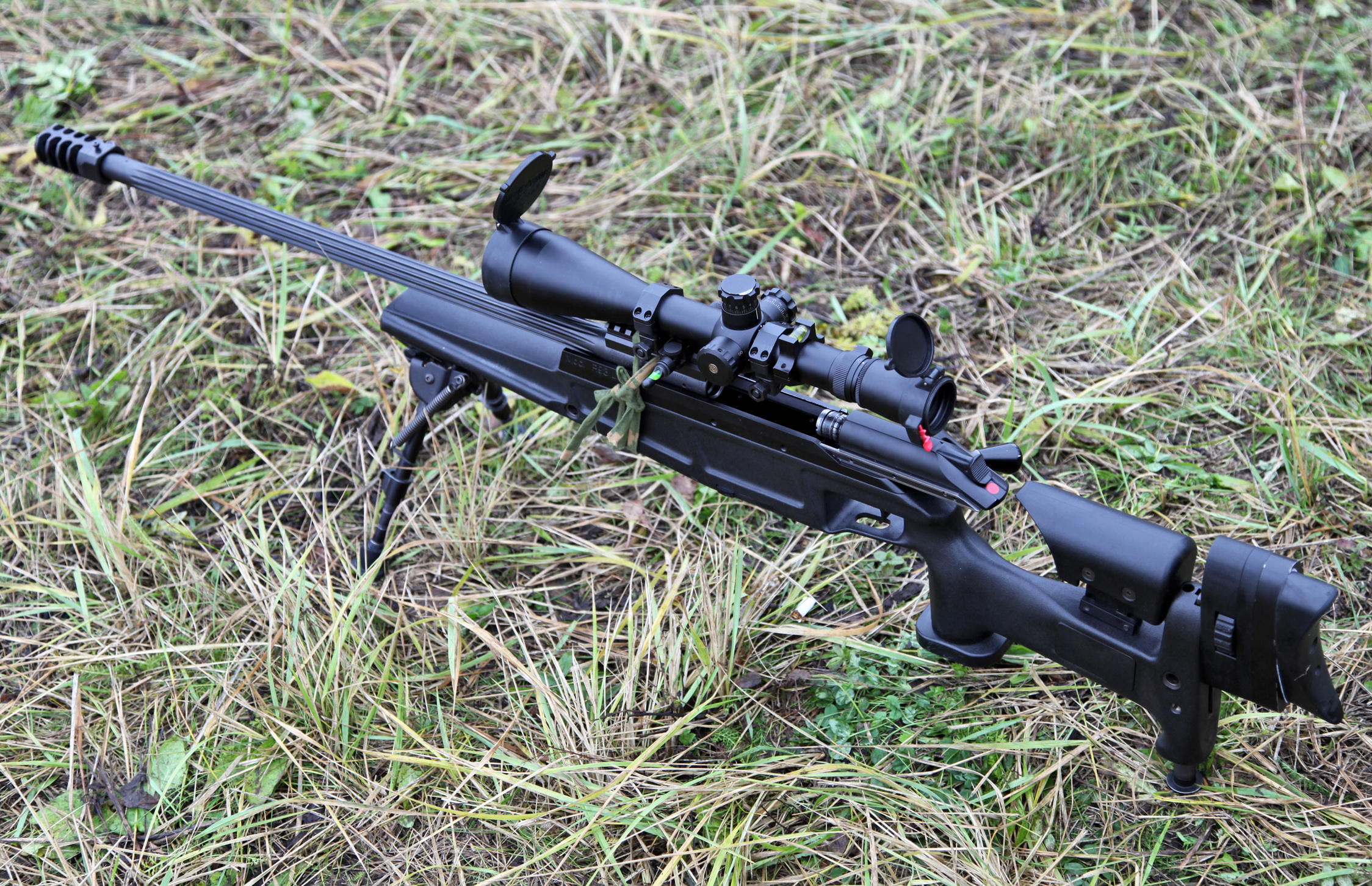 Blaser R93 LRS2 .308 Win